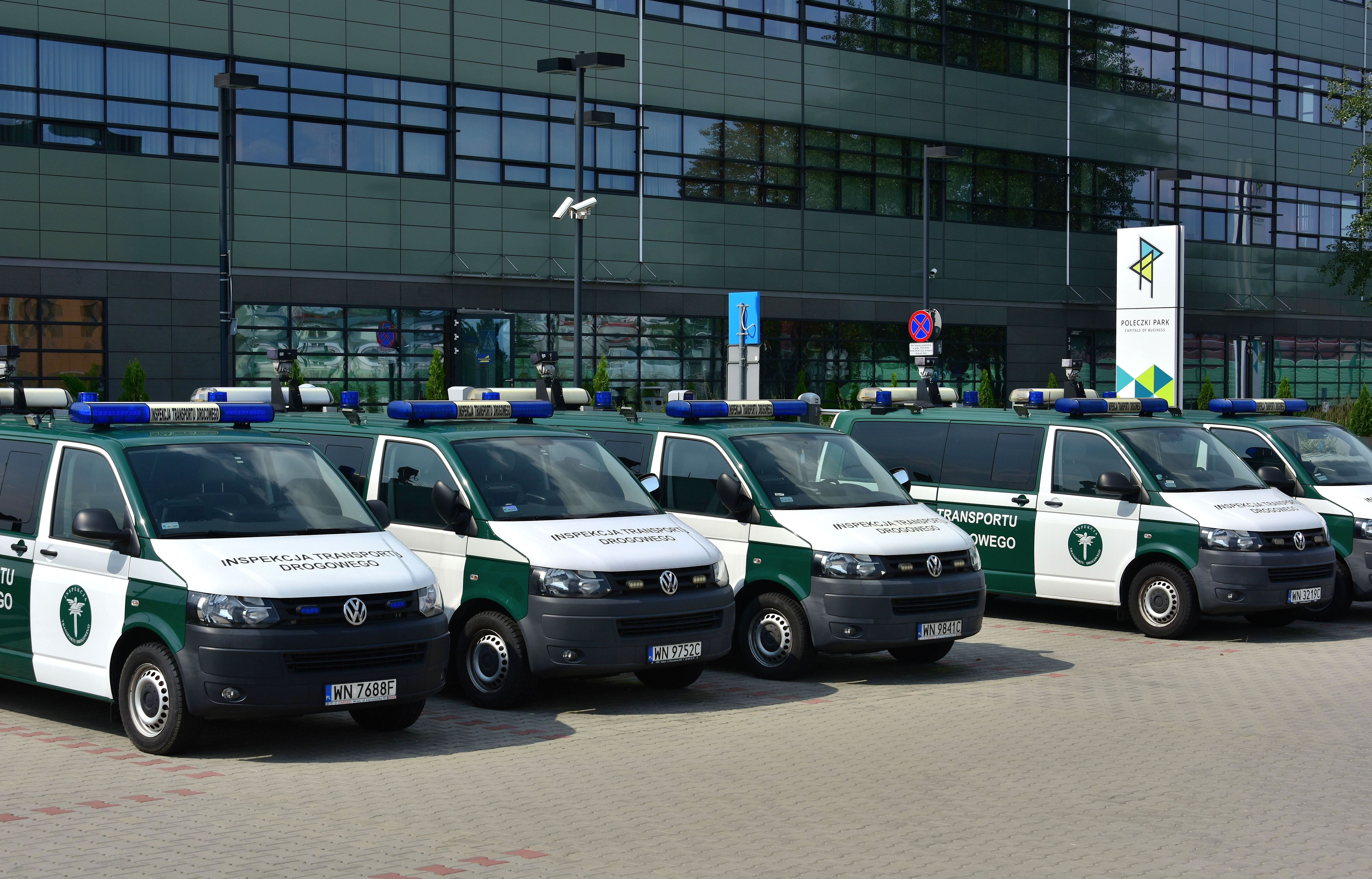 Samochody Inspekcji Transportu Drogowego na parkingu Poleczki Business Park w Warszawie